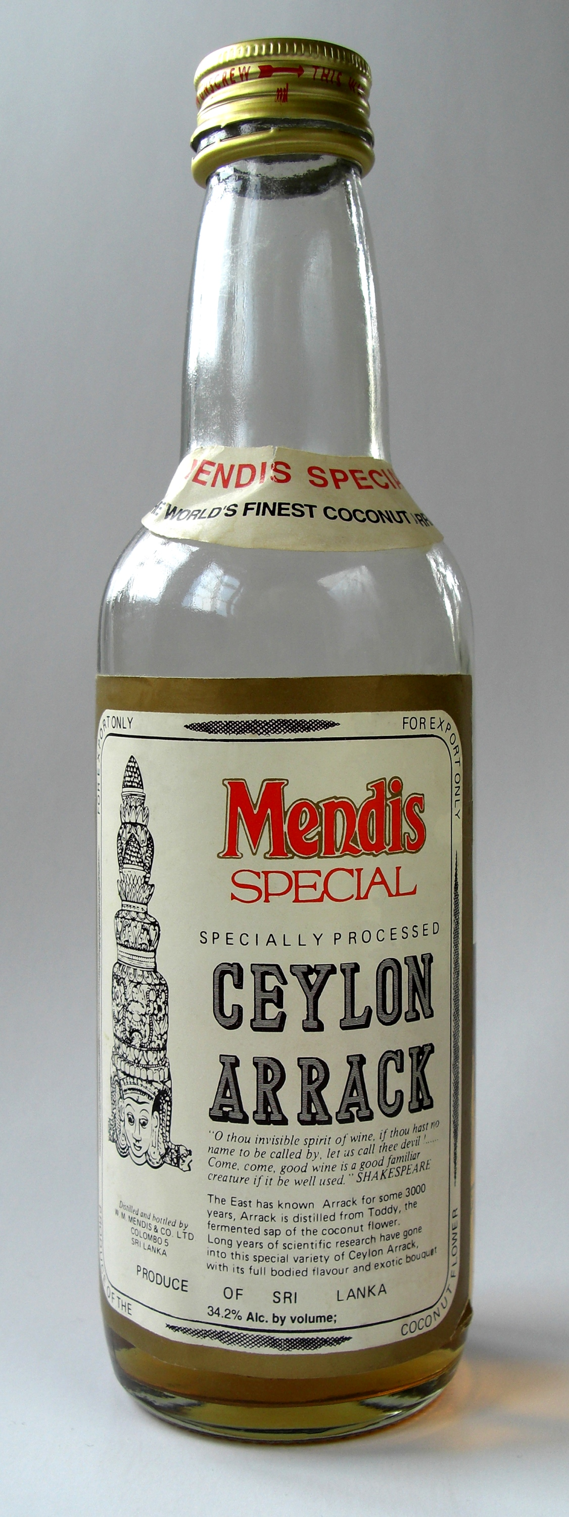 See title